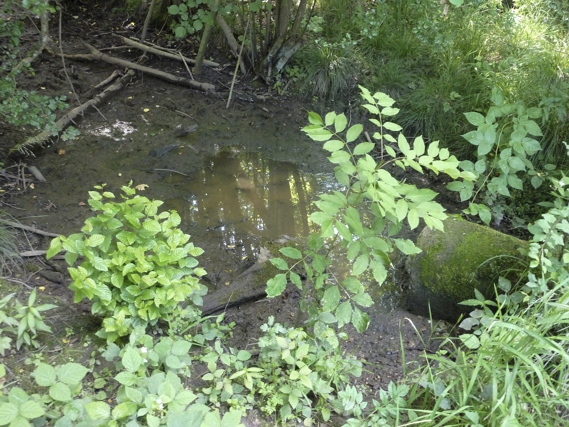 Frankfurt am Main: Die Kelster (auch Kelsterbach genannt), ein linker Zufluss des Flusses Main, hat ihr Quellgebiet im äußersten Westen des Frankfurter Stadtwaldes, östlich des Rohsees. Dieses Sumpfgebiet liegt am nordwestlichen Rand eines Teils der Schwanheimer Wiesen mit dem Flurnamen Kleine Wiese. Aufgrund des sumpfigen Charakters des Geländes, das zudem jahreszeitlich bedingt teilweise trockenfällt, ist die Quelle der Kelster nicht exakt lokalisierbar. Das Foto zeigt eine Ansicht des Sumpfgebiets von der Kleinwiesenschneise aus; Blick nach Westen